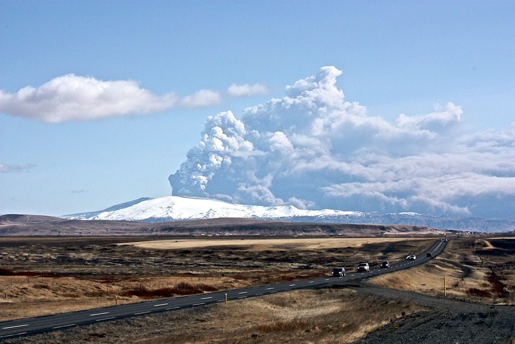 Frá þjóðveginum nálægt Hellu